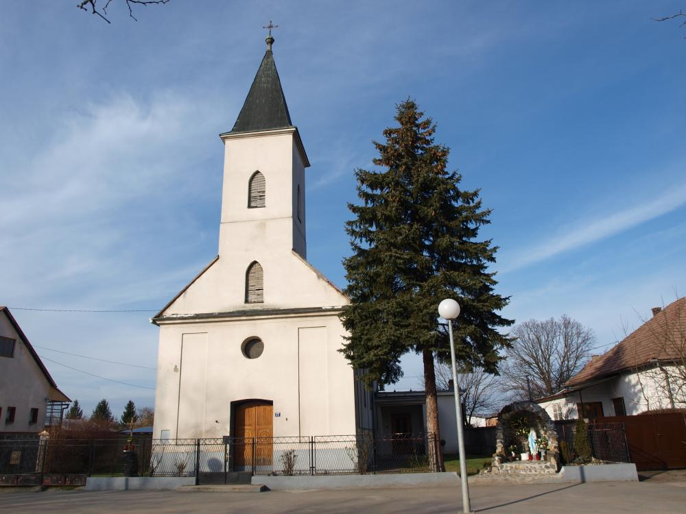 Crkva u općini Gornja Vrba, koja se nalazi u Brodsko-posavskoj županiji.